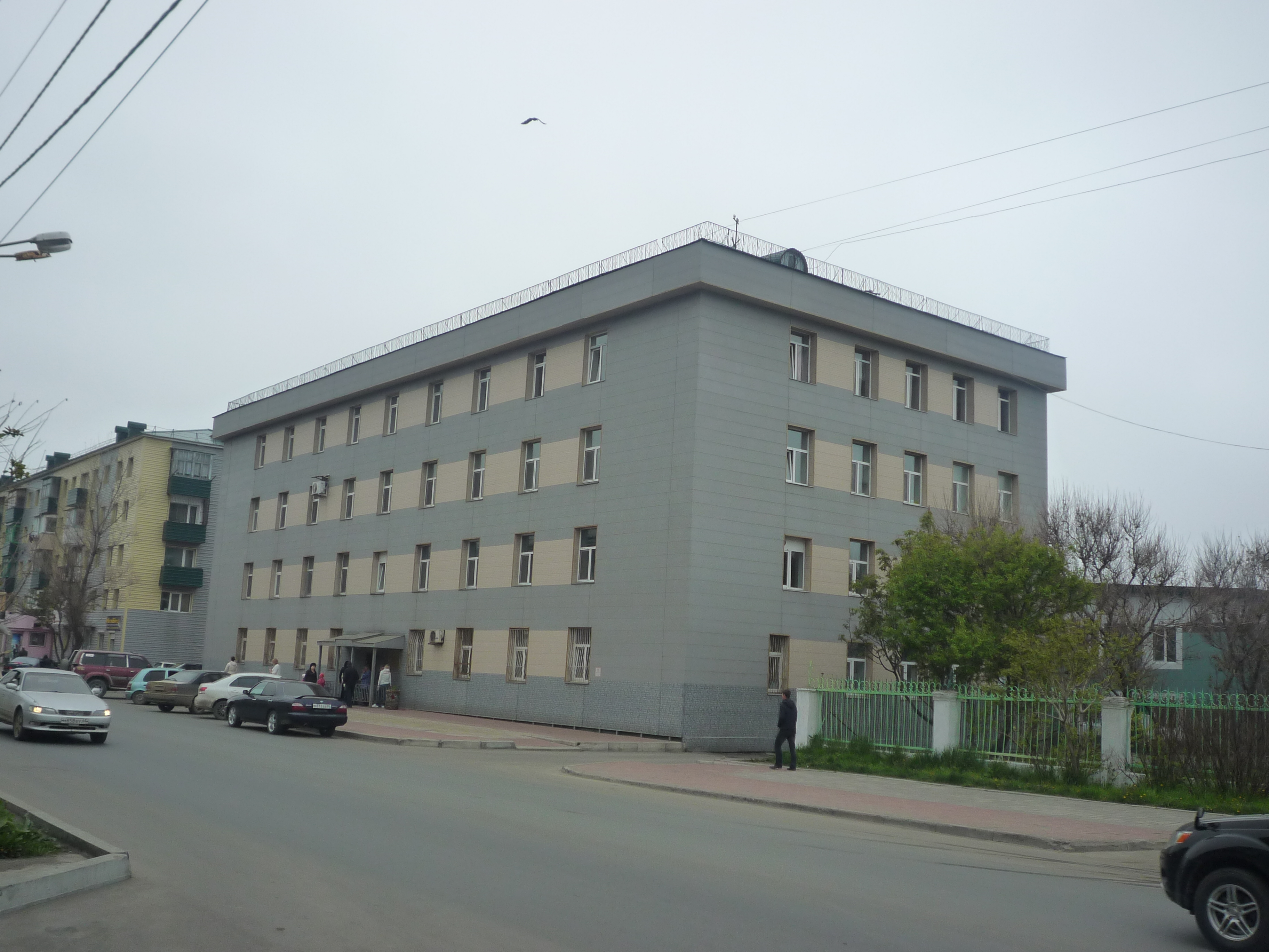 Холмская ЦРБ